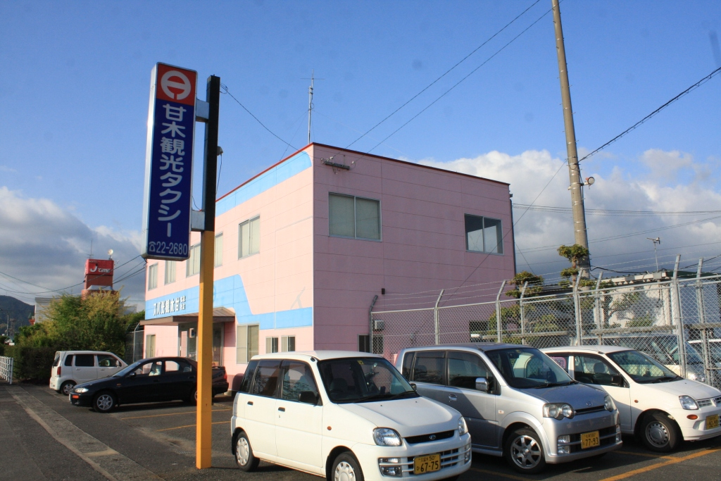 甘木観光バス本社